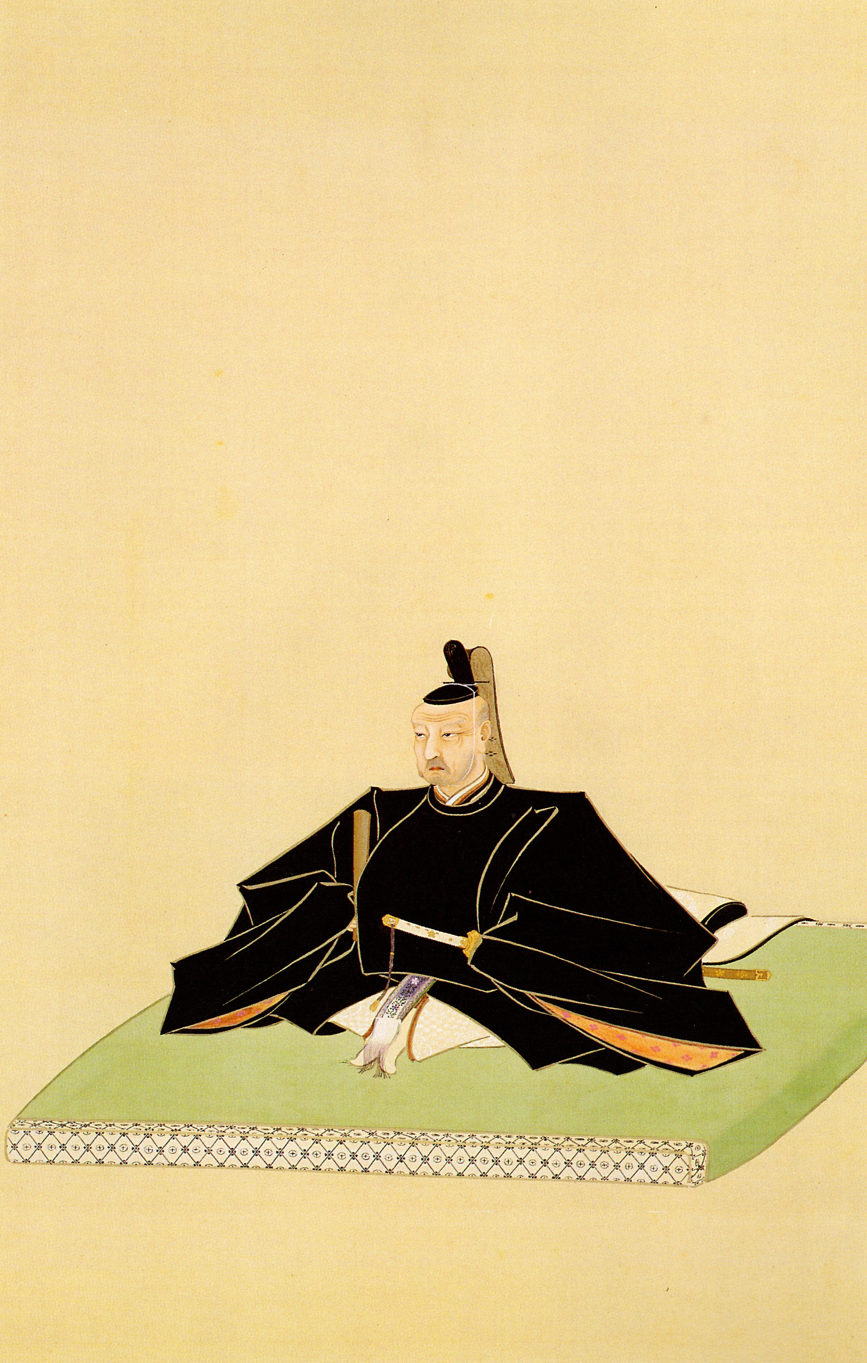 前田綱紀の肖像。